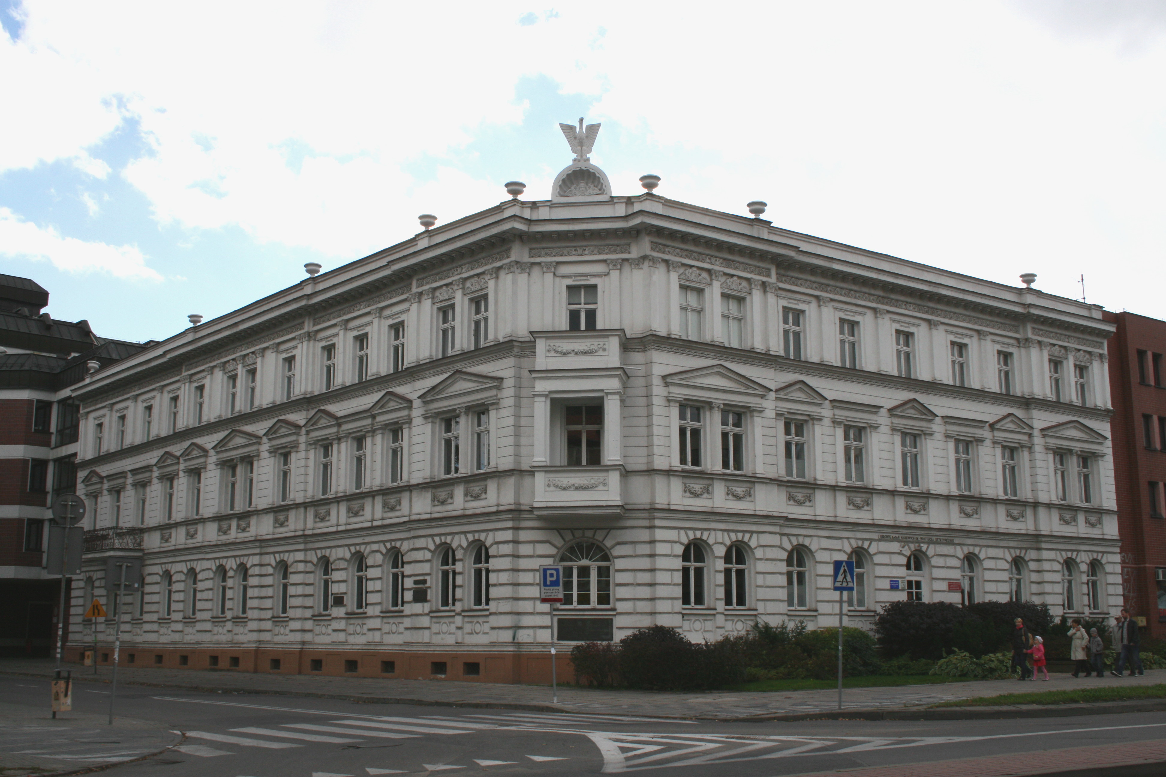 Dom Polski ul. Partyzantów 87, Miasto Olsztyn